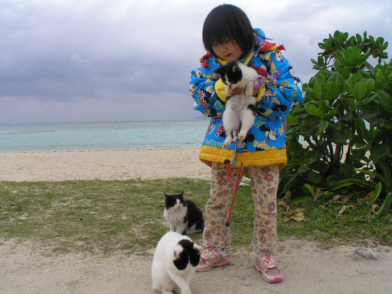 2006-01-23 Kondoi Beach Taketomi-Island,Okinawa コンドイ浜（沖縄県八重山郡竹富町竹富）少女と猫